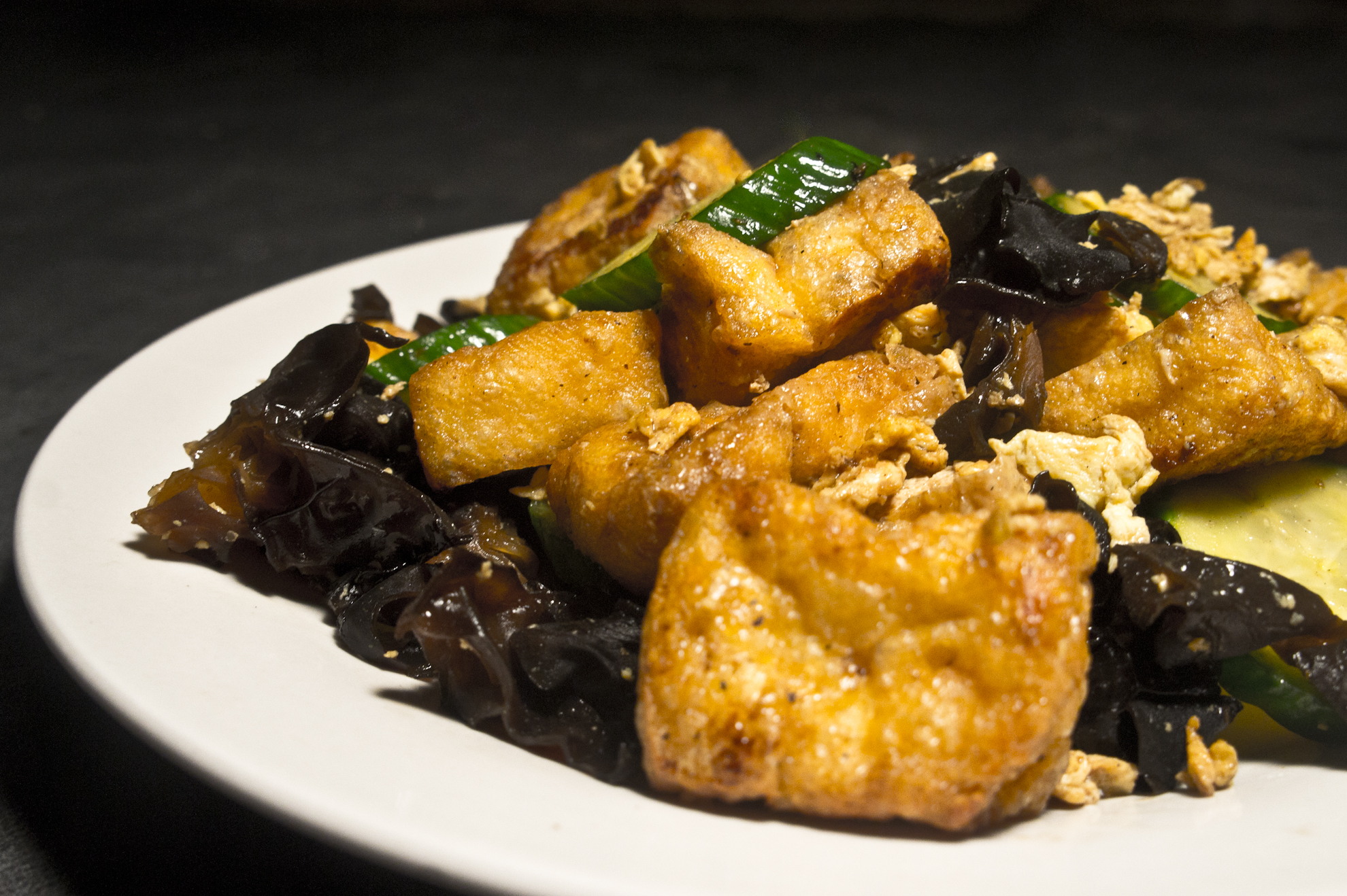 木须肉